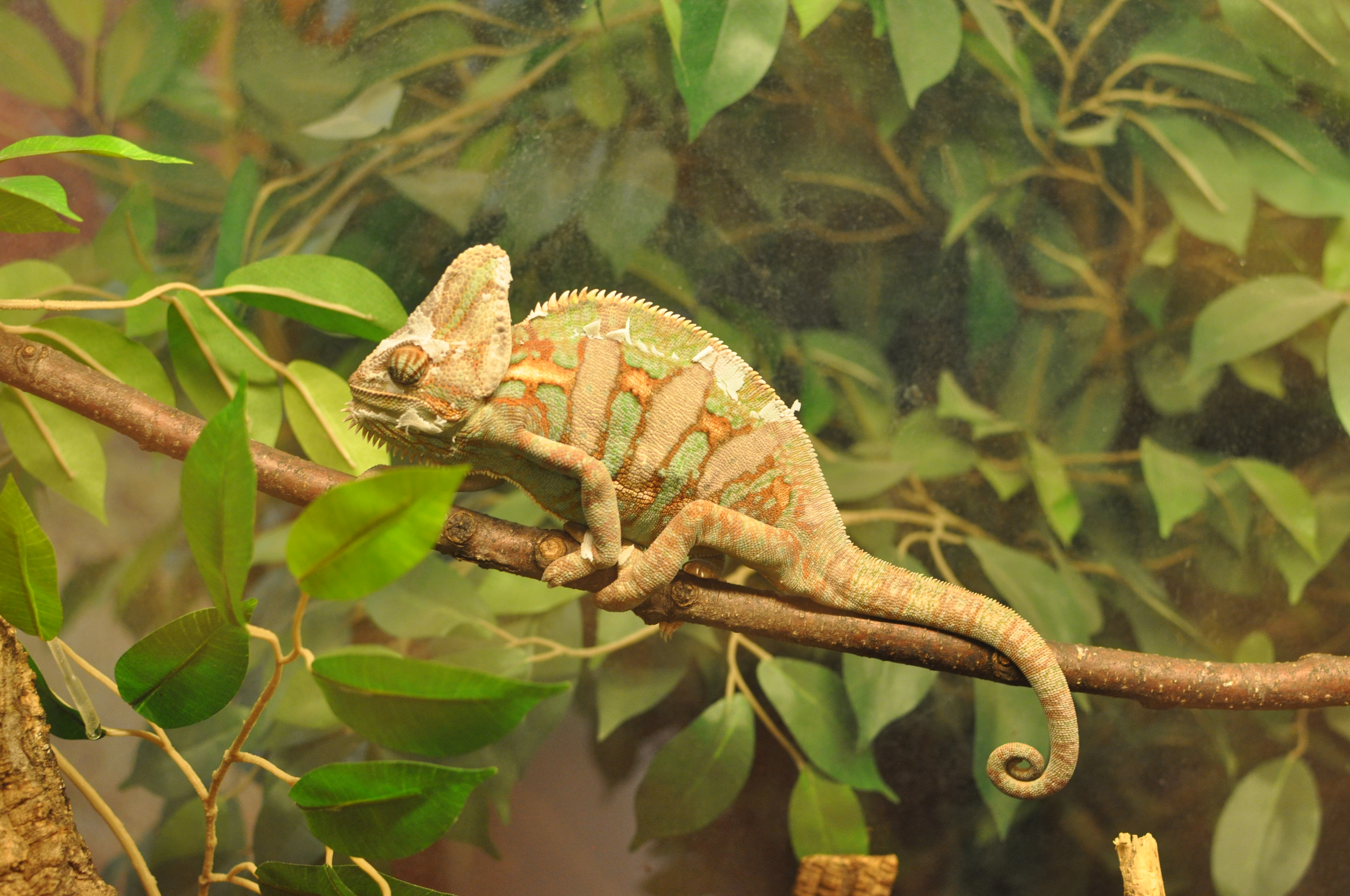 Chamaeleo calyptratus (Jemenchamäleon bei der Häutung)